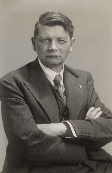 Porträt von Hans Bernoulli